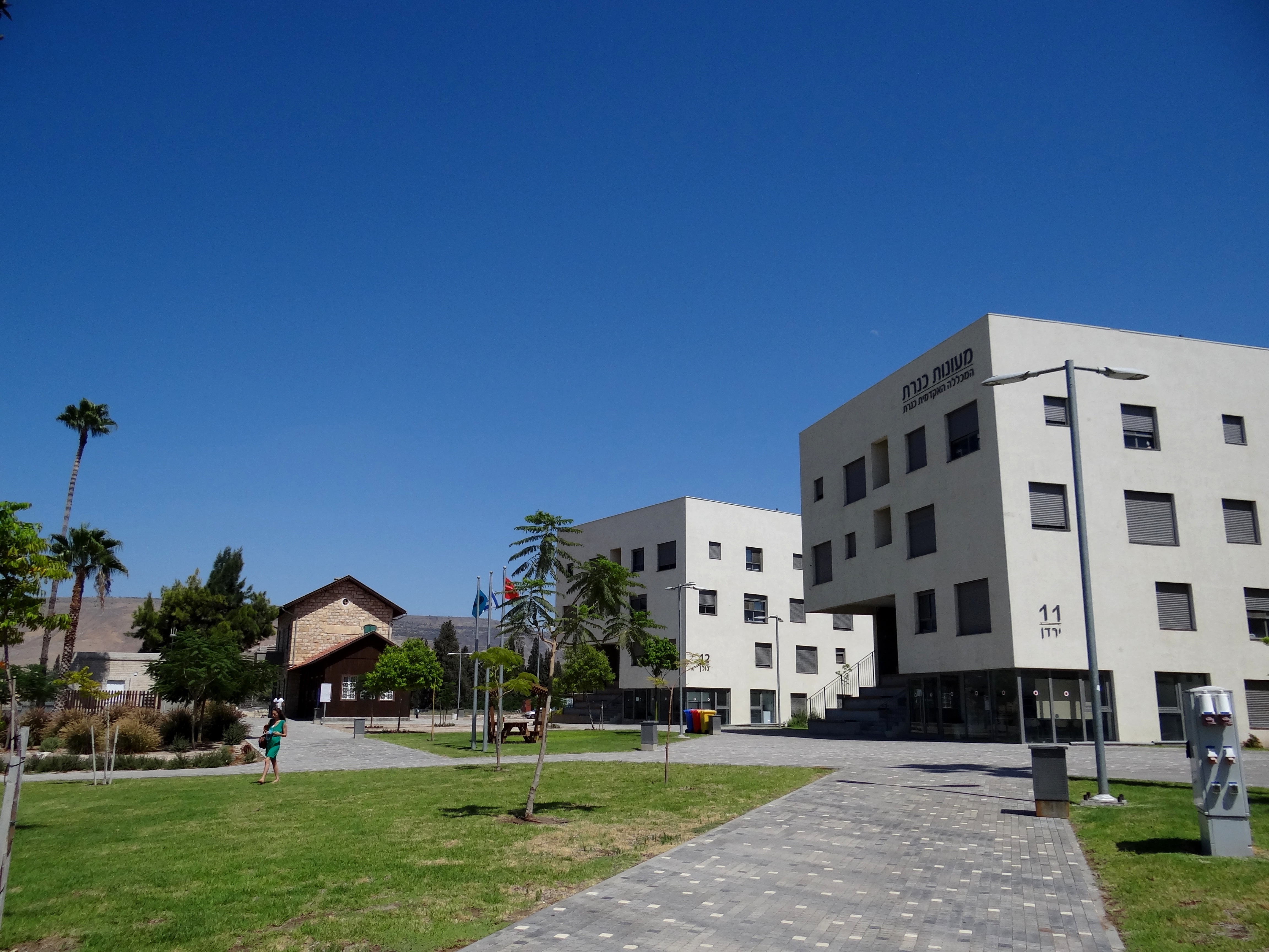 תחנת הרכבת סמח' הייתה תחנת הרכבת של העיירה הערבית סמח' (سمخ) שהייתה בדרומה של הכנרת עד למלחמת העצמאות. התחנה היא שריד לרכבת העמק שהוקמה על ידי הסולטאן הטורקי עבדול חמיד השני במטרה לקשר את העיר דמשק עם חוף הים התיכון. שרידי התחנה מצויים כיום במרכז האזורי צמח מדרום לכביש 92 בקטע מ"צומת צמח" ל"צומת מעגן". המבנים משמשים נכון ליולי 2017: את המחלקה ללימודי ארץ ישראל במכללת כנרת, מכון כנרת לארכאולוגיה גלילית , מכון כנרת ע"ש דן שומרון והקתדרה לתולדות ארץ ישראל ע"ש בורנבלום